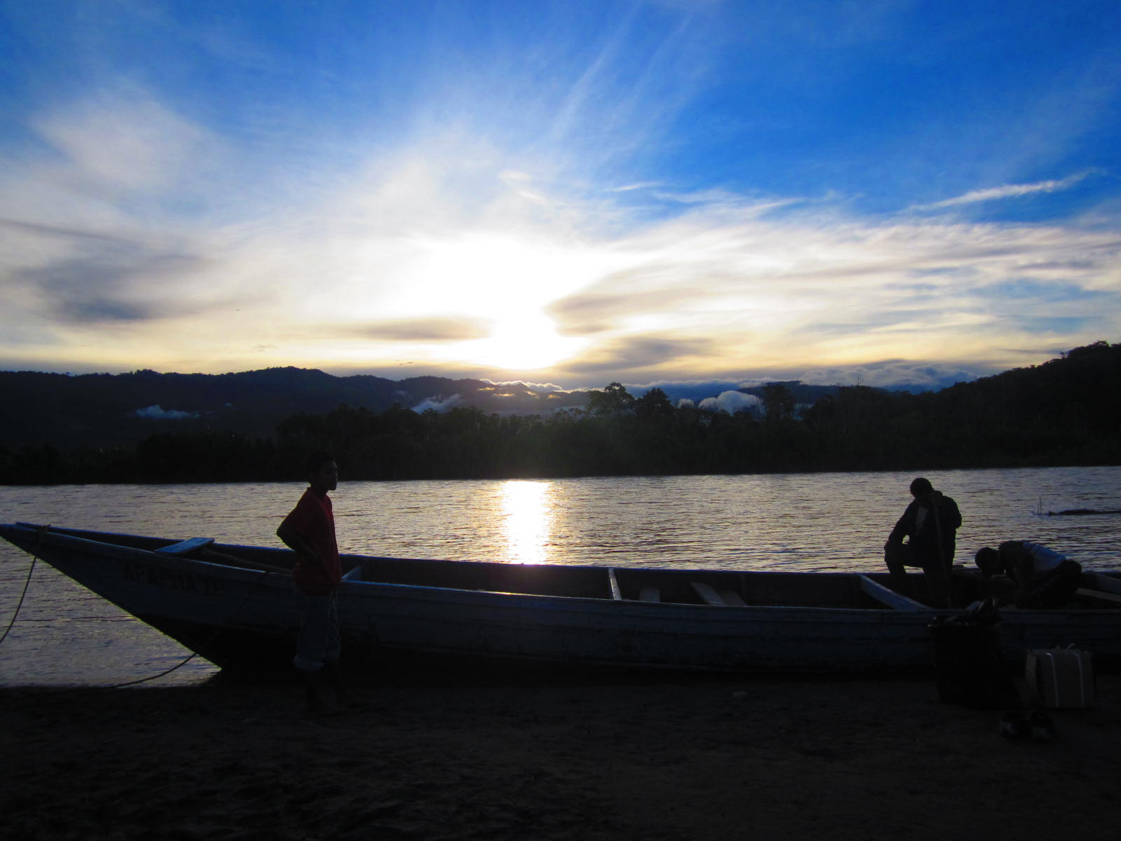 este rio baña el valle del mismo nombre y es un afluente principal y el as caudaloso del Huallaga